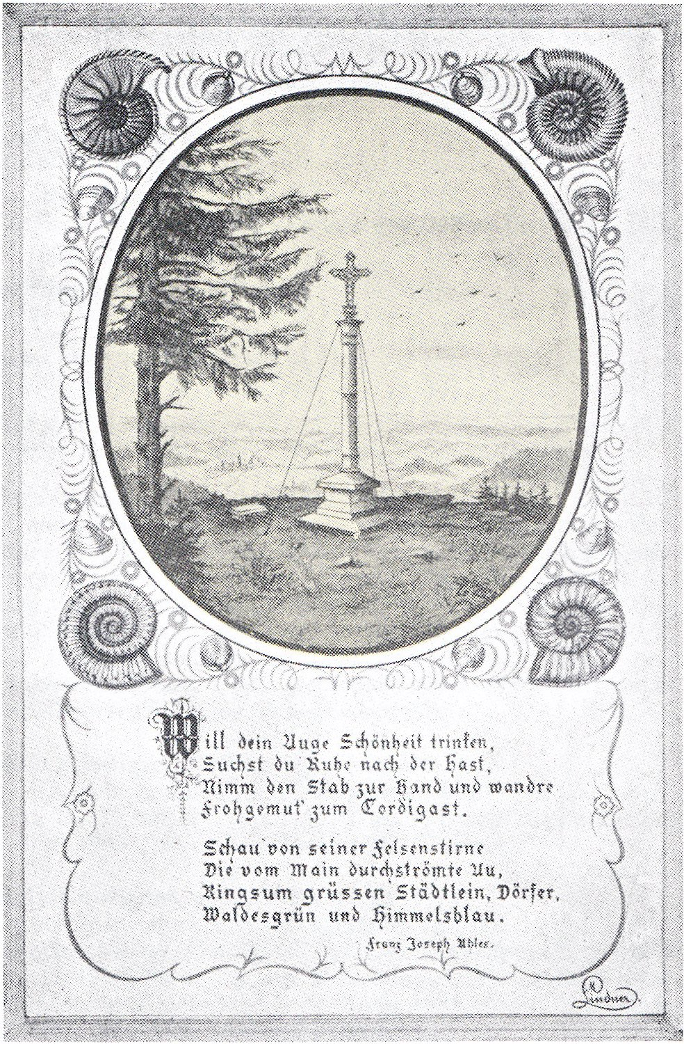 Ansichtskarte des Kordigasts. Zu sehen ist eine Zeichnung von Max Lindner des um 1850 errichteten Gipfelkreuzes auf dem Großen Kordigast, darunter zwei Verse des Heimatdichters Franz Joseph Ahles über den Kordigast.